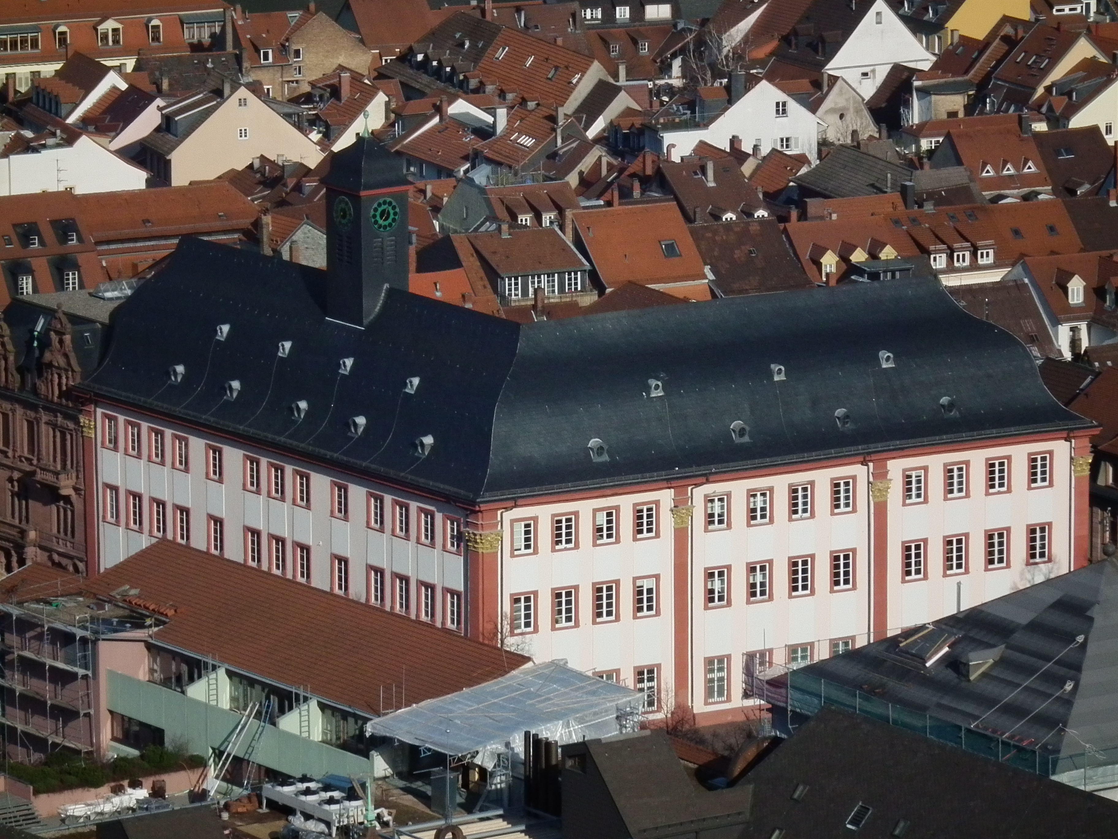 Alte Aula der Universität Heidelberg in der Altstadt (Baden-Württemberg, Deutschland)